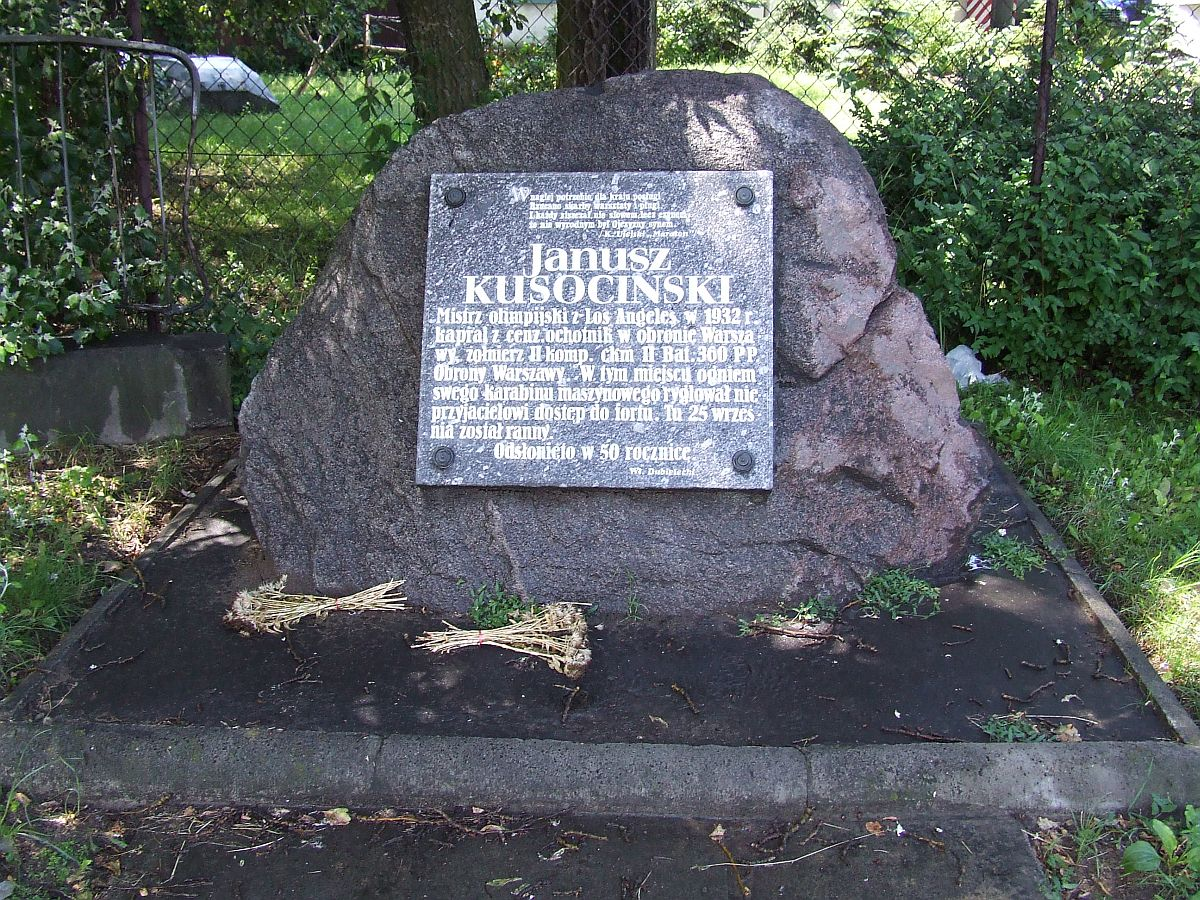 Fort IX Twierdzy Warszawa, Warsaw